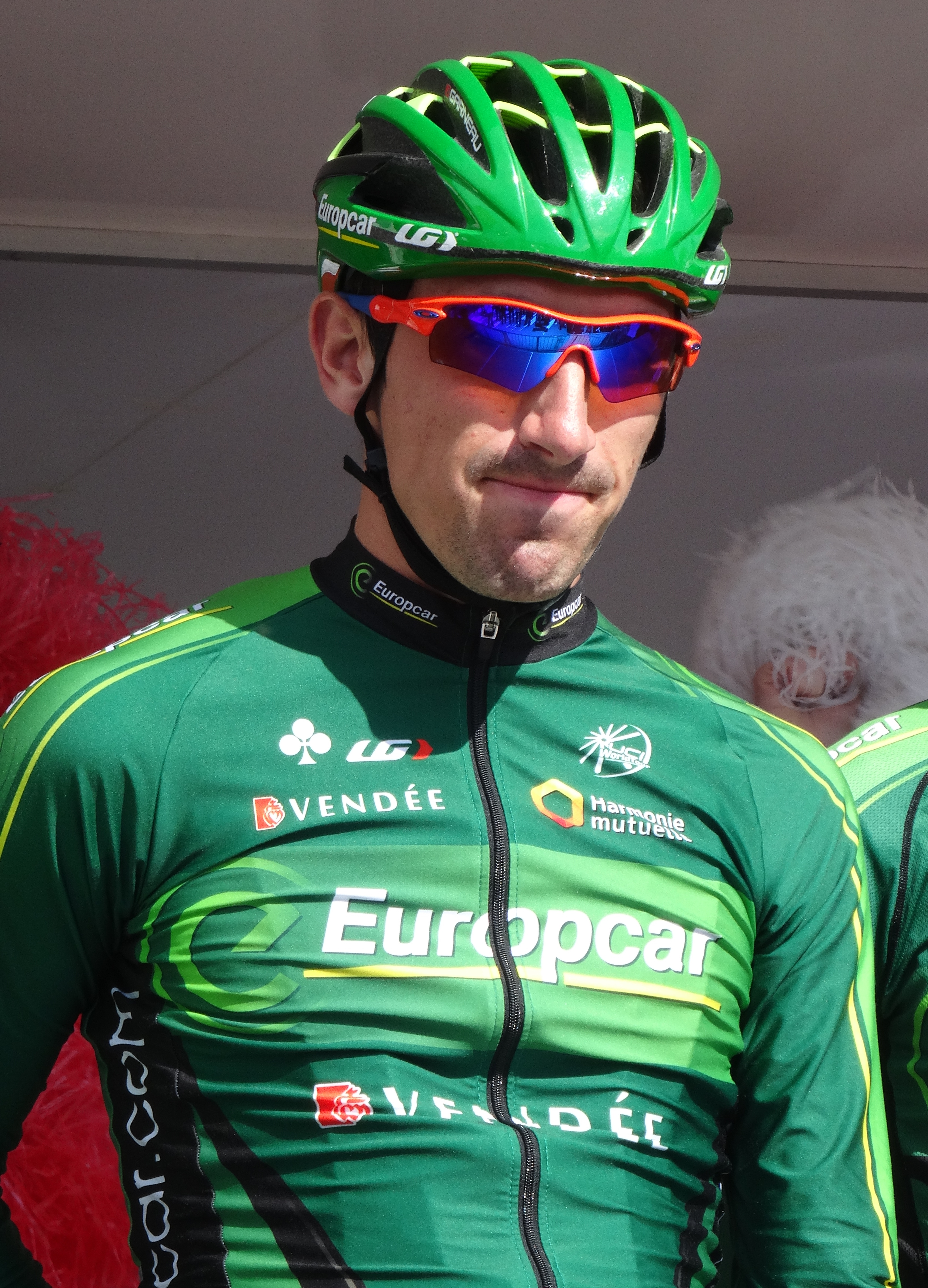 Reportage réalisé le jeudi 17 avril à l'occasion du départ et de l'arrivée du Grand Prix de Denain 2014 à Denain, Nord, Nord-Pas-de-Calais, France.